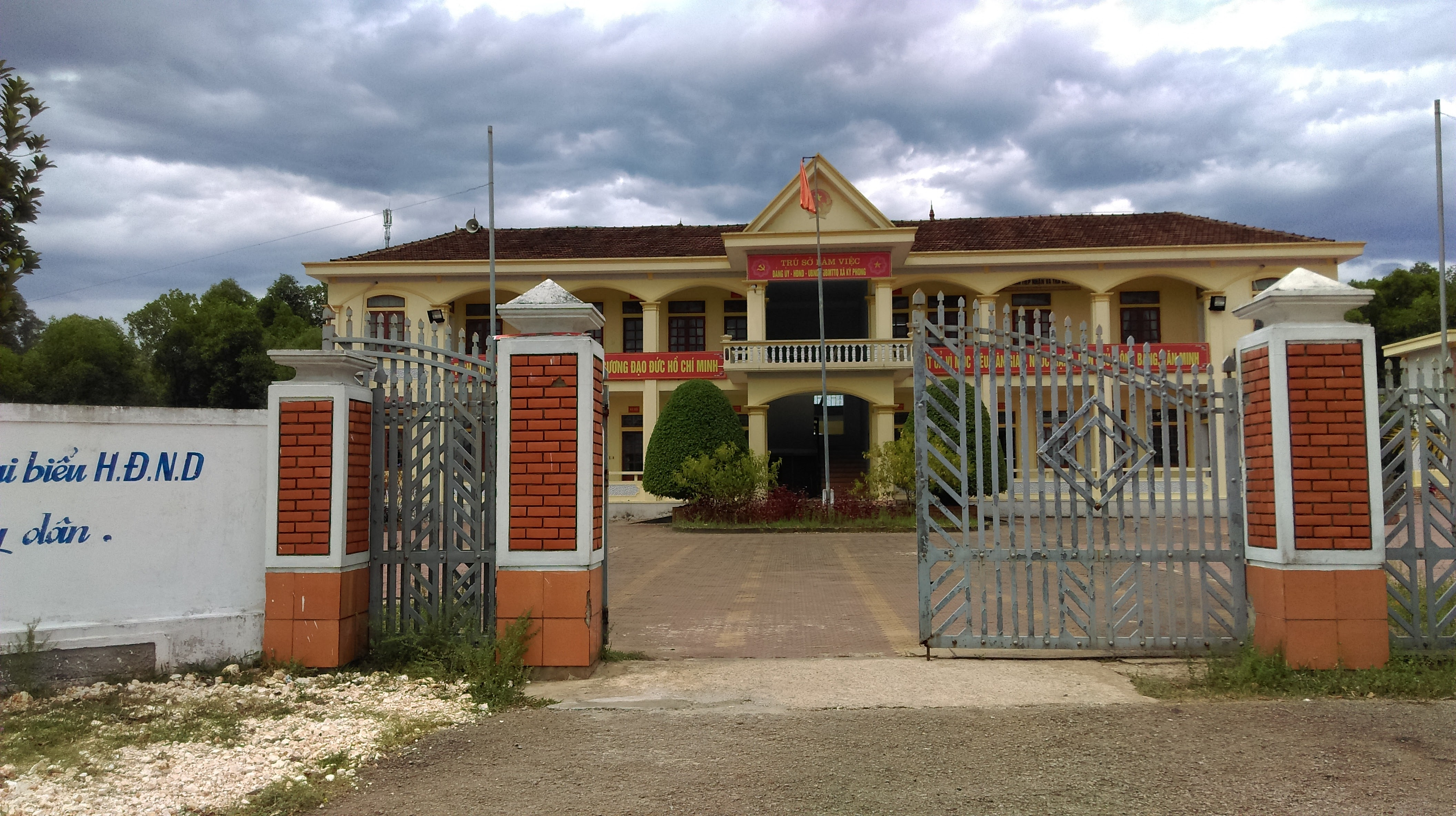 UBND xã Kỳ Phong, Kỳ Anh, Hà Tĩnh